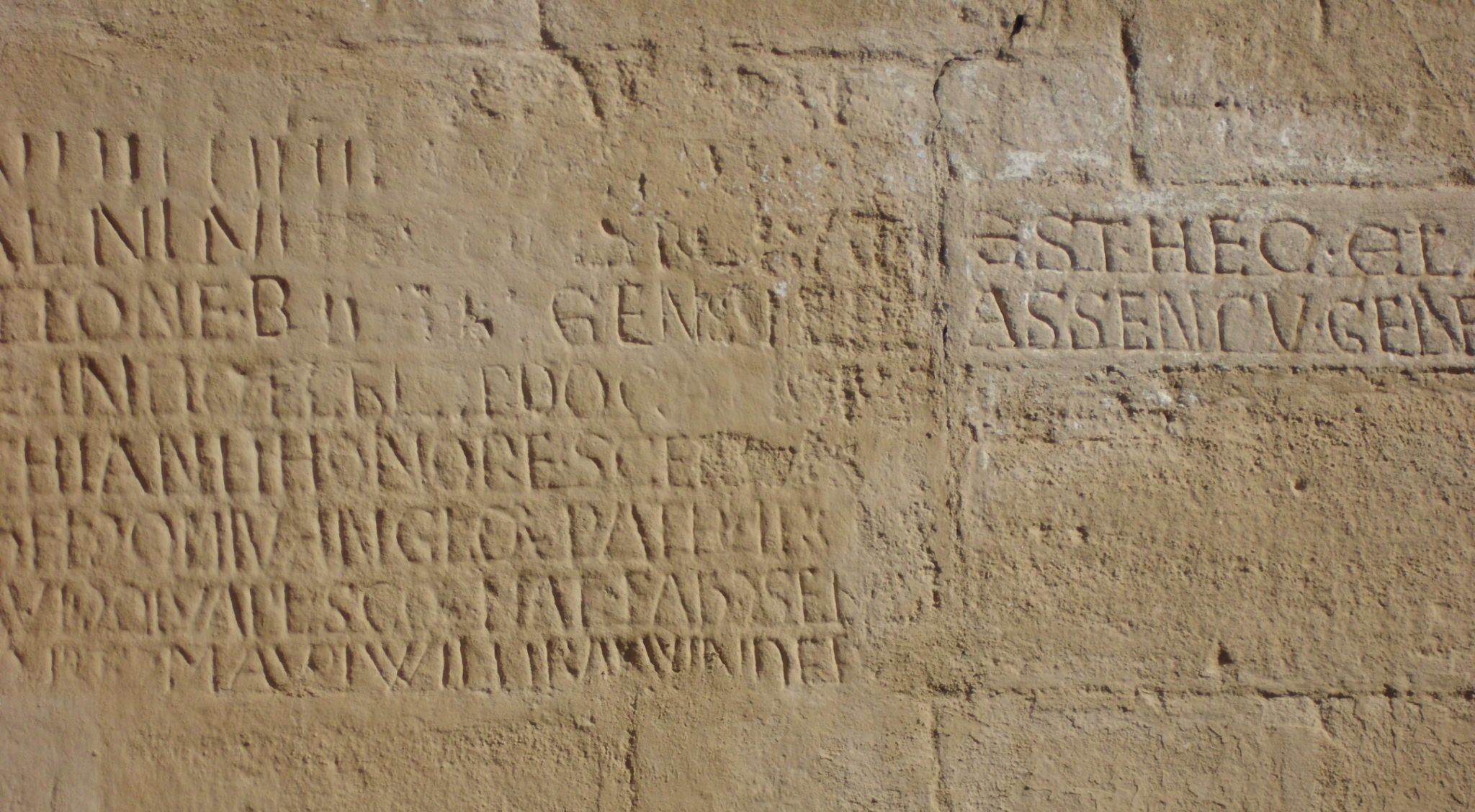 Evang.-Luth. Pfarrkirche St. Michael in Pfofeld im Landkreis Weißenburg-, lateinische Weiheinschrift neben dem Eingang auf der Südseite